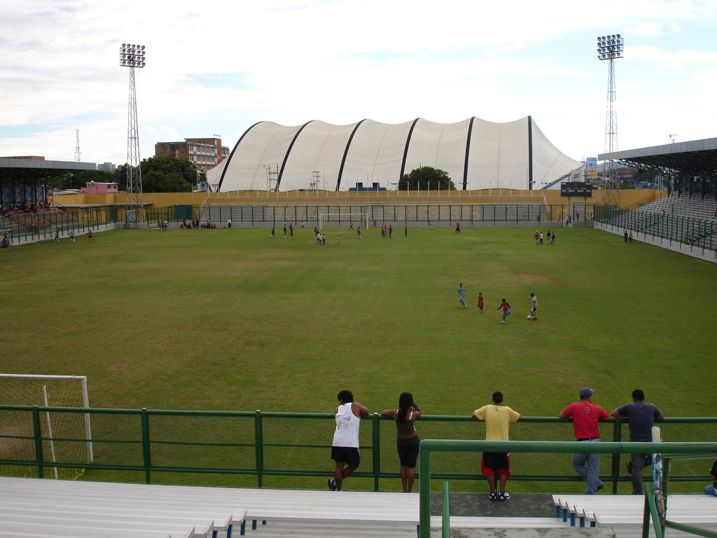 Estadio Farid Richa de Barquisimeto